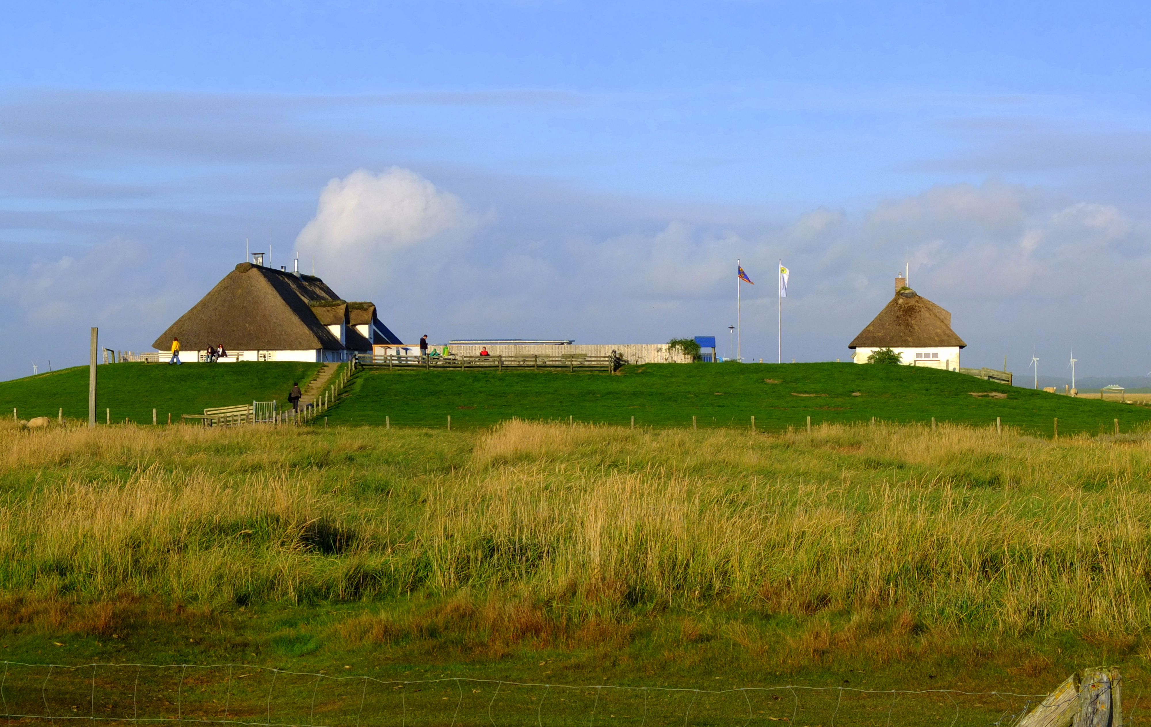 Die Hamburger Hallig von der Badestelle aus